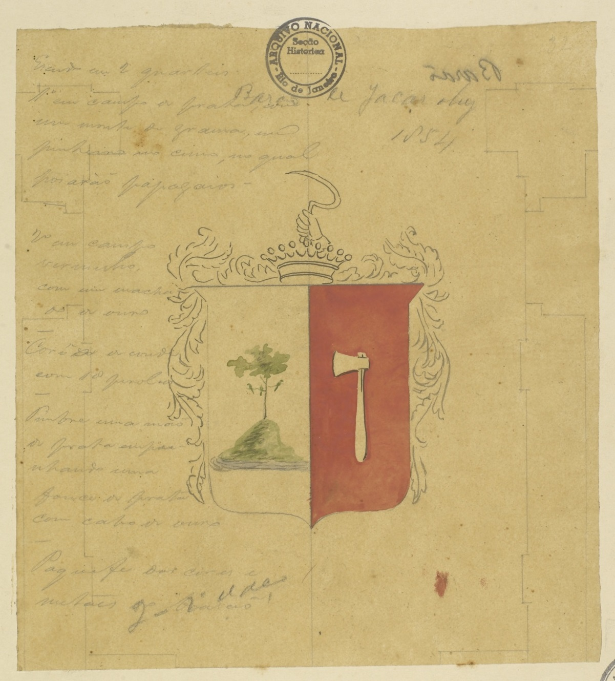 Brasão de Bento Lúcio Machado, Barão de Jacareí (SP). Fundo: Brasões.